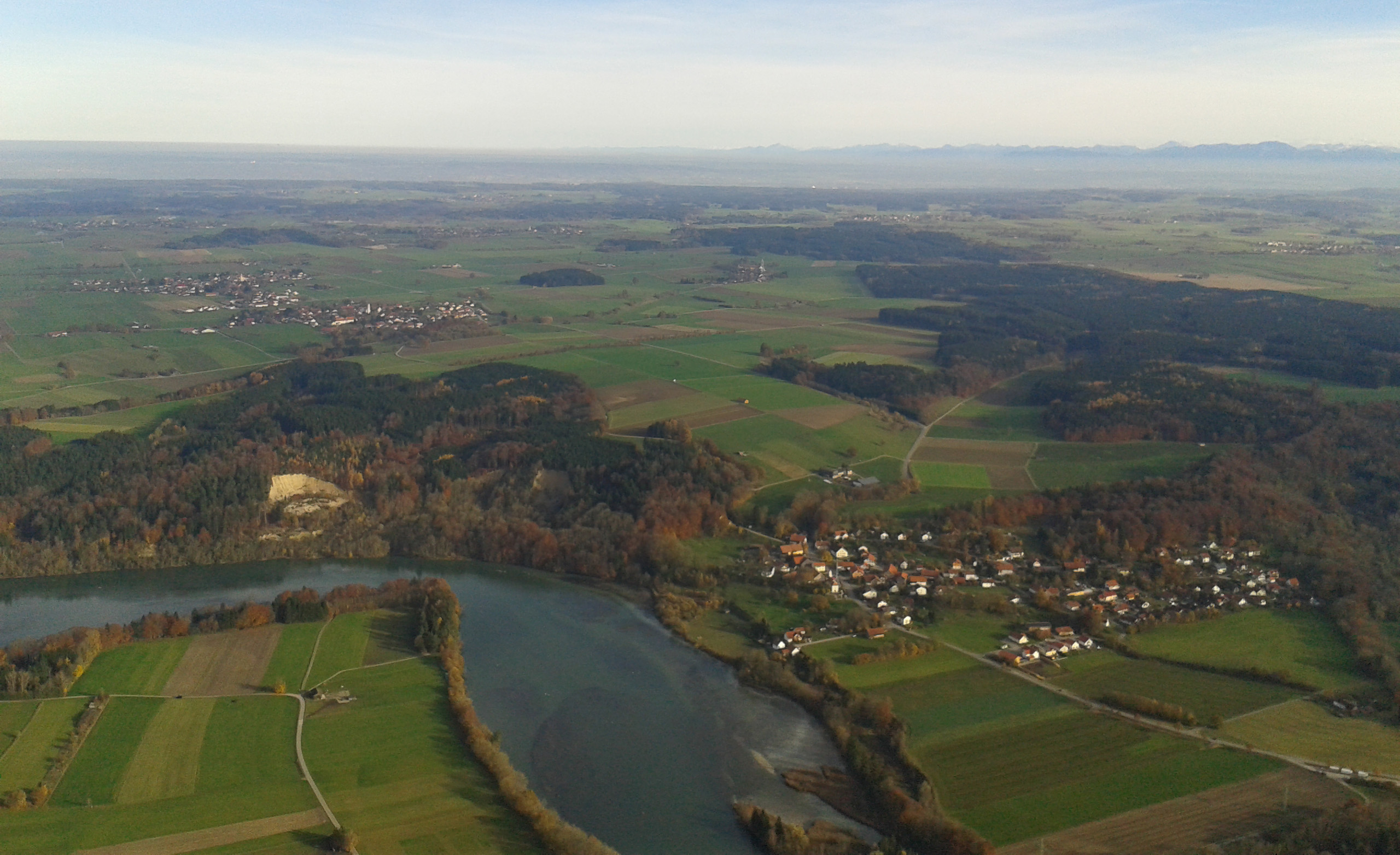 Luftbild der Gemeinde Vilgertshofen von Westen